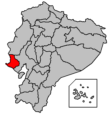 Ubicación de esta provincia en el Ecuador